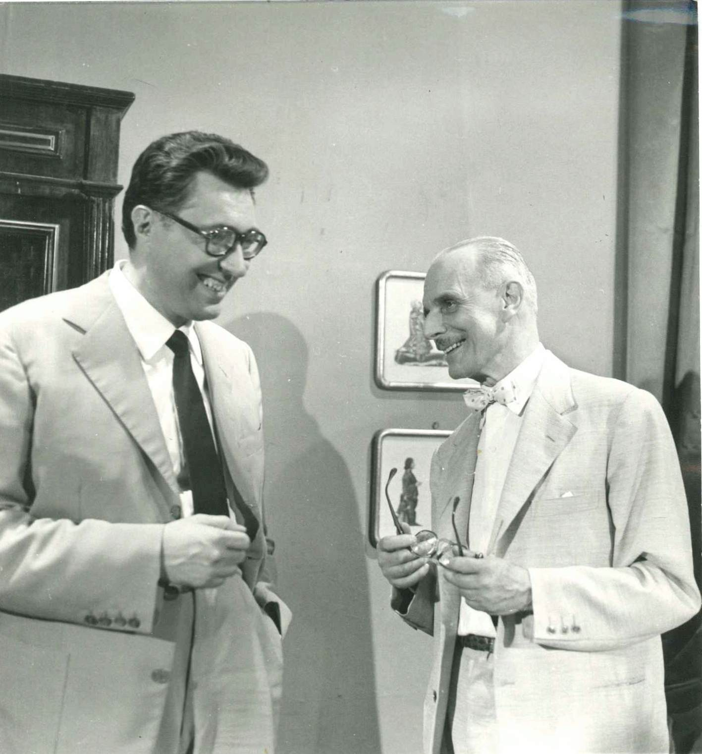 Lo scrittore e presentatore TV Luigi Silori e l'attore teatrale Sergio Tofano in casa di Silori a Roma (1959)